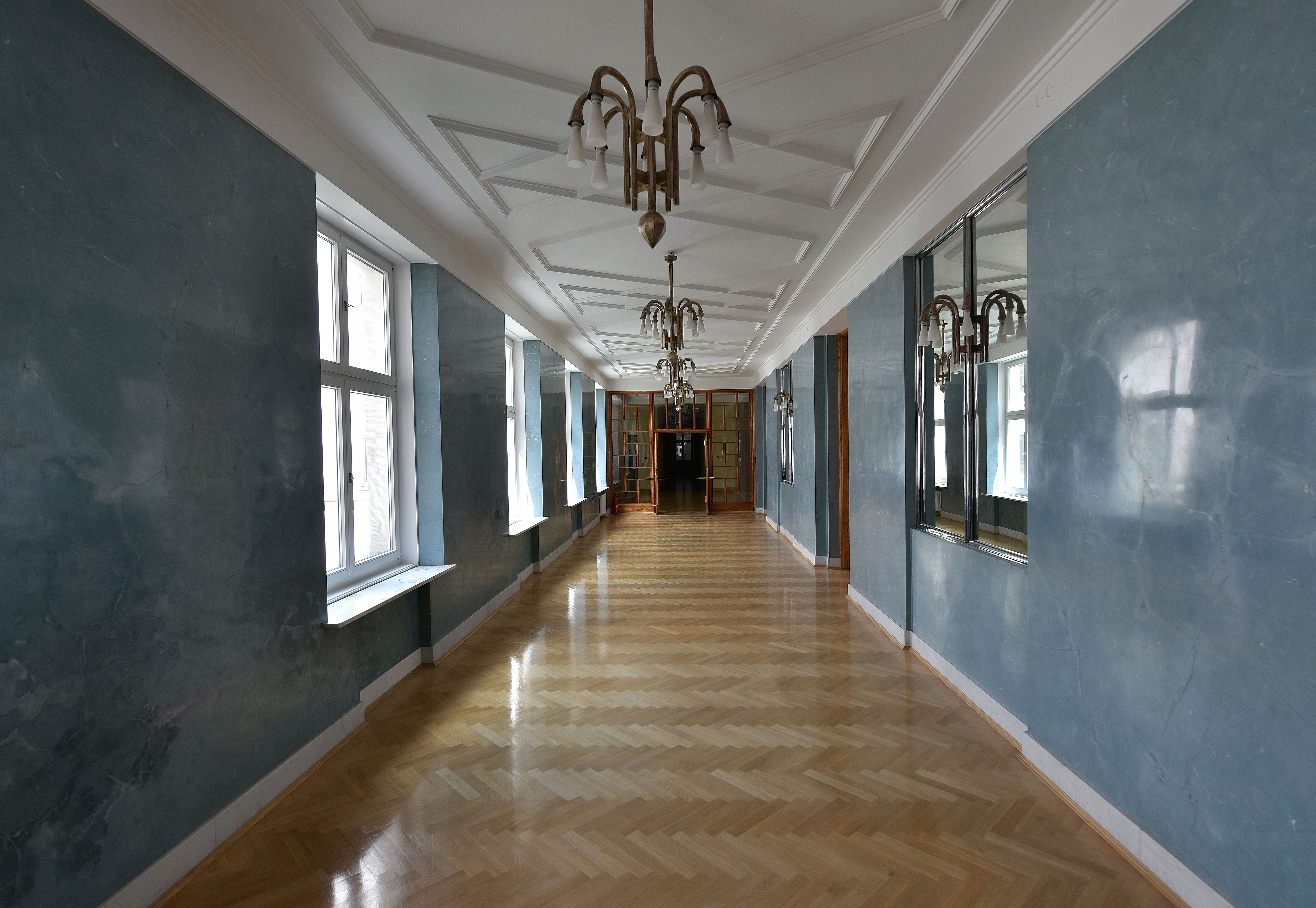 Korytarz I piętra gmachu Ministerstwa Wyznań Religijnych i Oświecenia Publicznego (obecnie Ministerstwo Edukacji Narodowej) w Warszawie